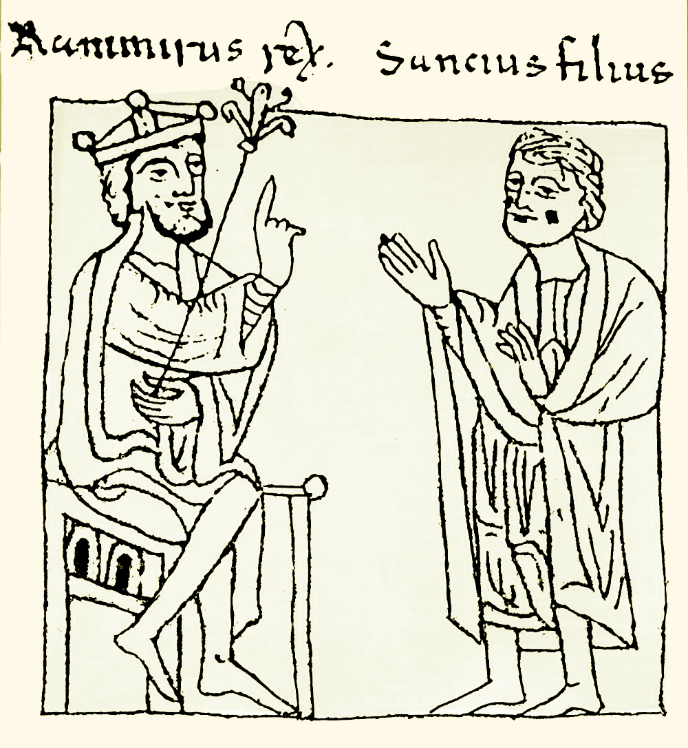 Ramiro I de Aragón y su hijo, Sancho Ramírez. Miniatura del siglo XIII de Jaca. (Huesca, Aragón, España)